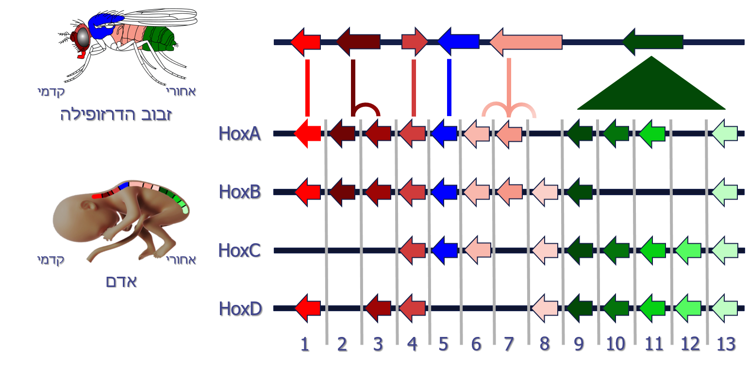 גני HOX בזבוב הדרוזופילה (פנל עליון) ובאדם (פנלים תחתונים – HOXA-D) הנתונים נאספו מאתר: מעניין, שסדר הגנים בגנום הוא לפי סדר האיברים בגוף.